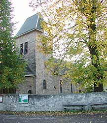 Barchfeld, Ev. Kirche, 1914